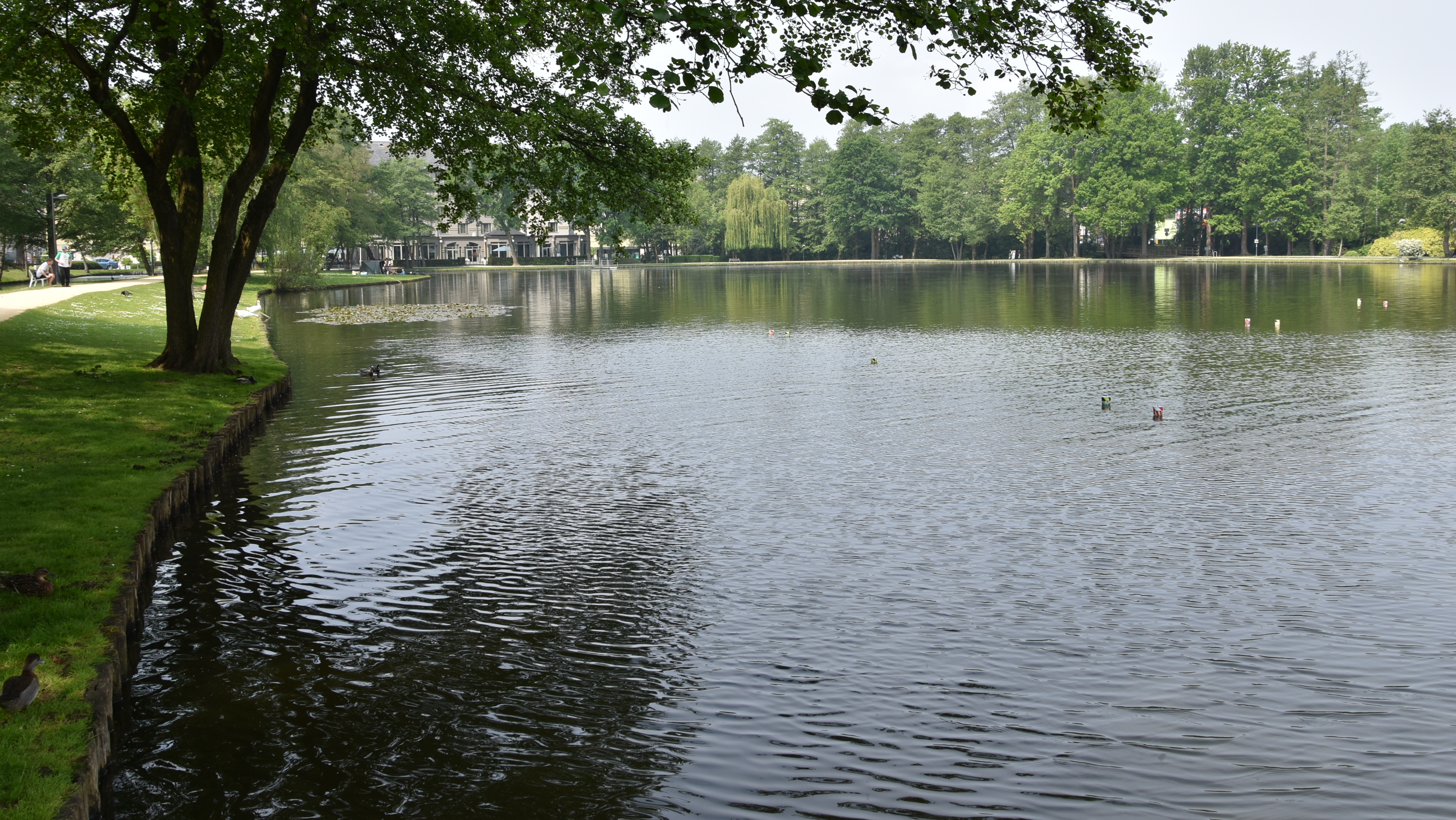 Molenvijverpark Genk 19-05-2019 11-54-37